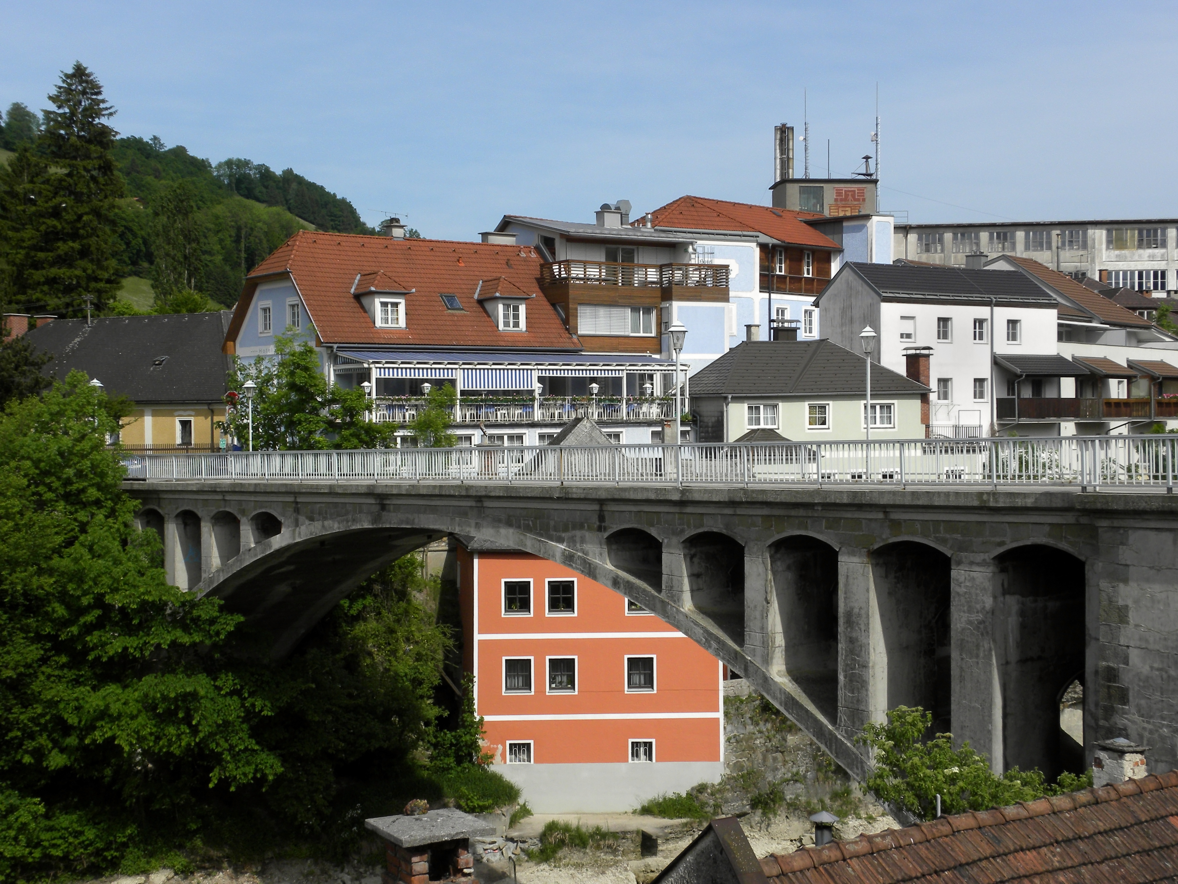 Die Obere Zeller Brücke bzw. Zeller Hochbrücke wurde 1898 von der Gemeinde Markt Zell als Kaiser Franz Josef I-Regierungs-Jubiläums-Brücke erbaut und 1969/1979 renoviert. Sie liegt 17 Meter hoch über der Ybbs und hat eine Spannweite von 44,6 Meter.